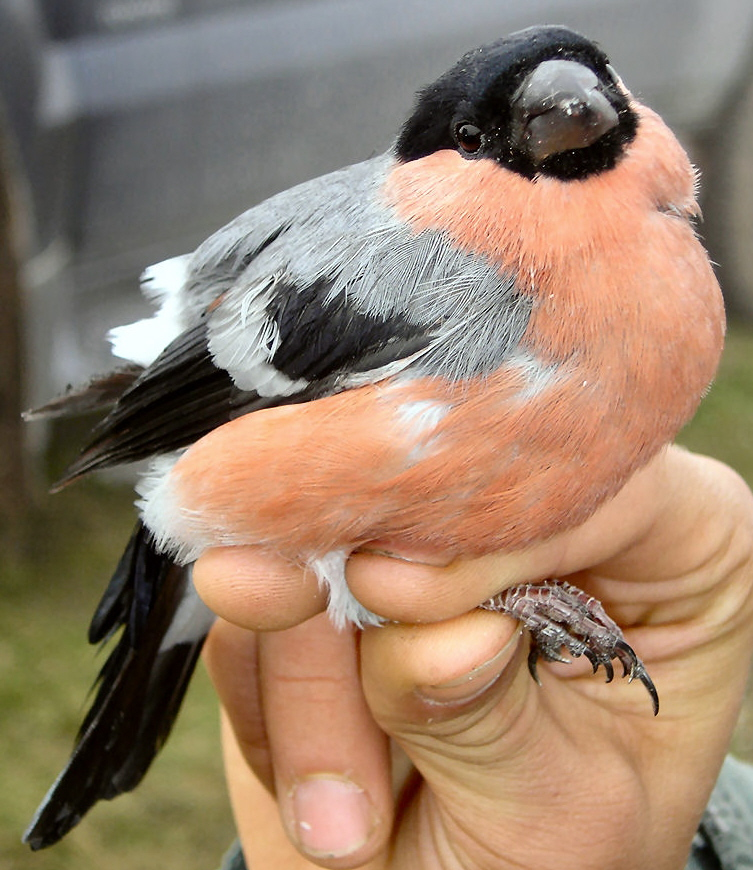 Pyrrhula pyrrhula young male